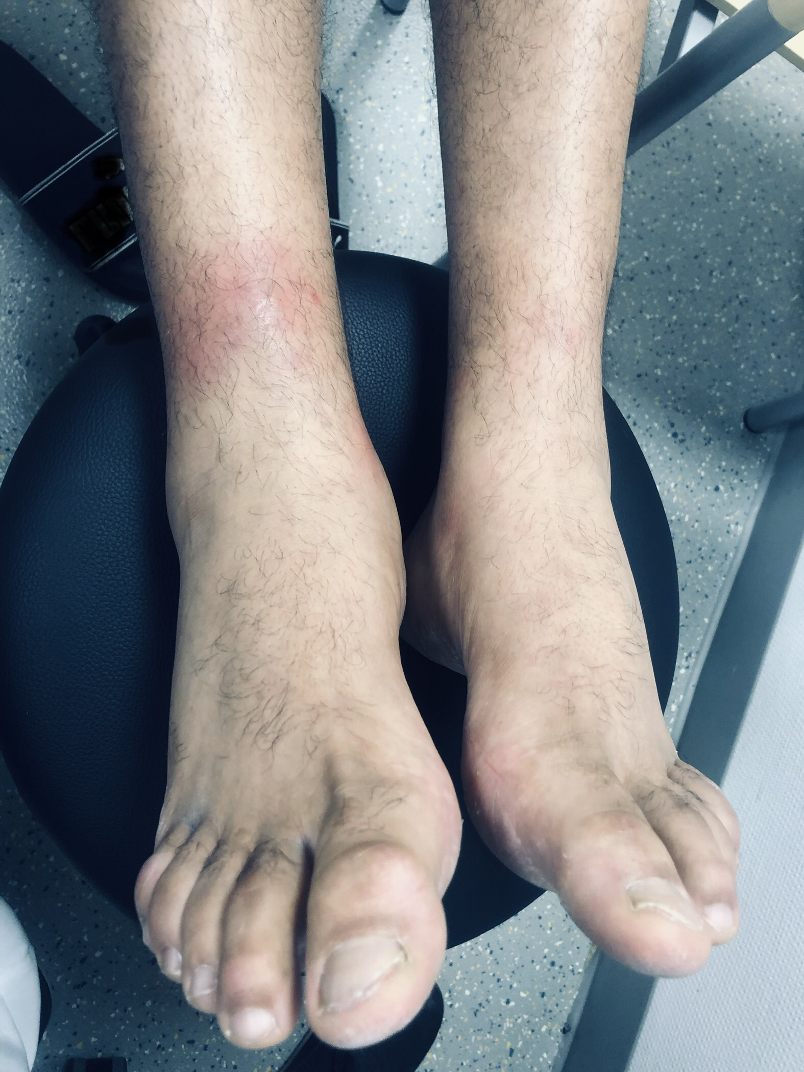 Ein 32 jähriger Patient mit Erythema nodosum bei Löfgren